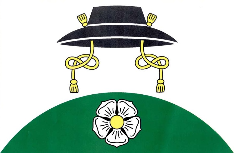 Vlajka obce Vysoké Popovice